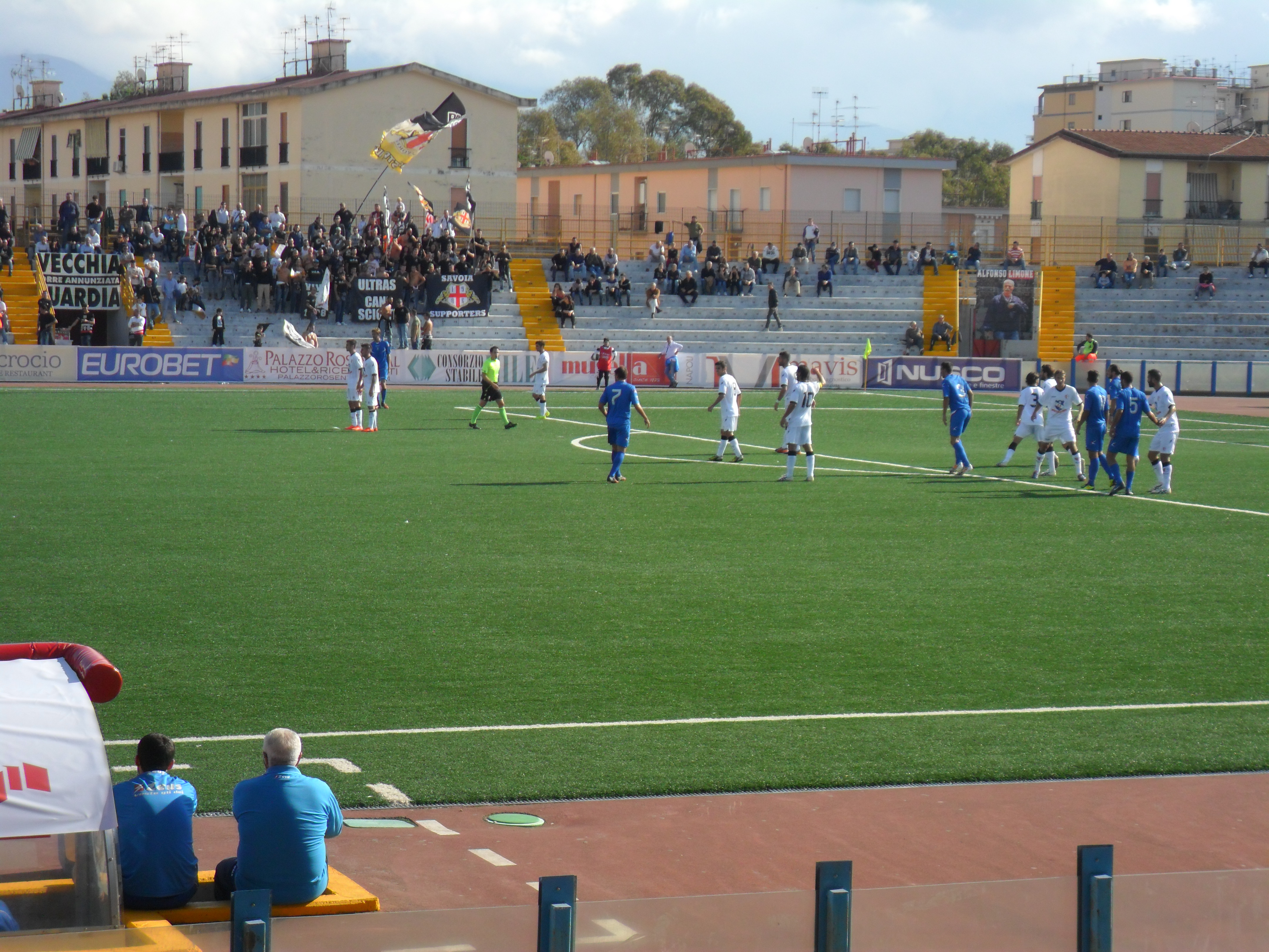 Un'azione di gioco durante Savoia - Paganese del 9 novembre 2014